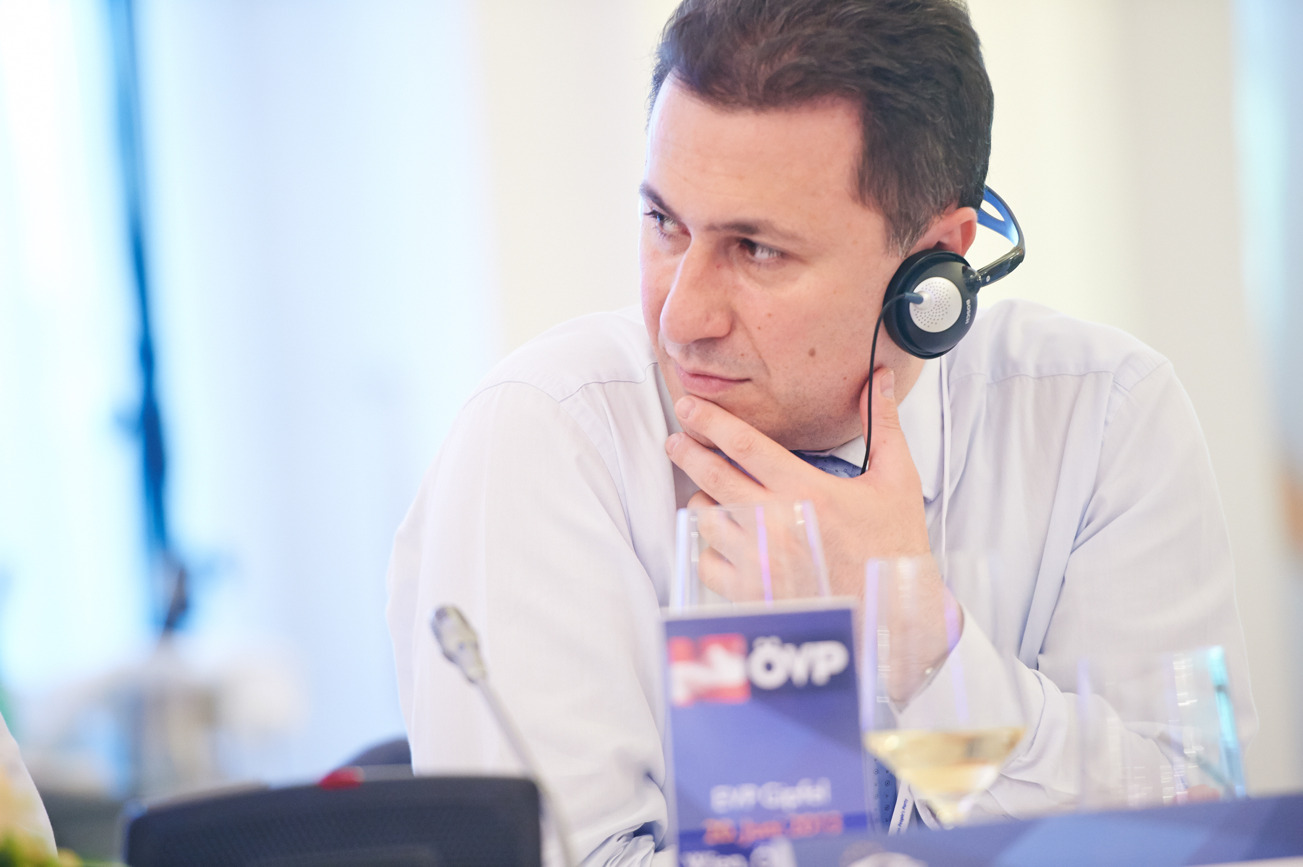 Nikola Gruevski